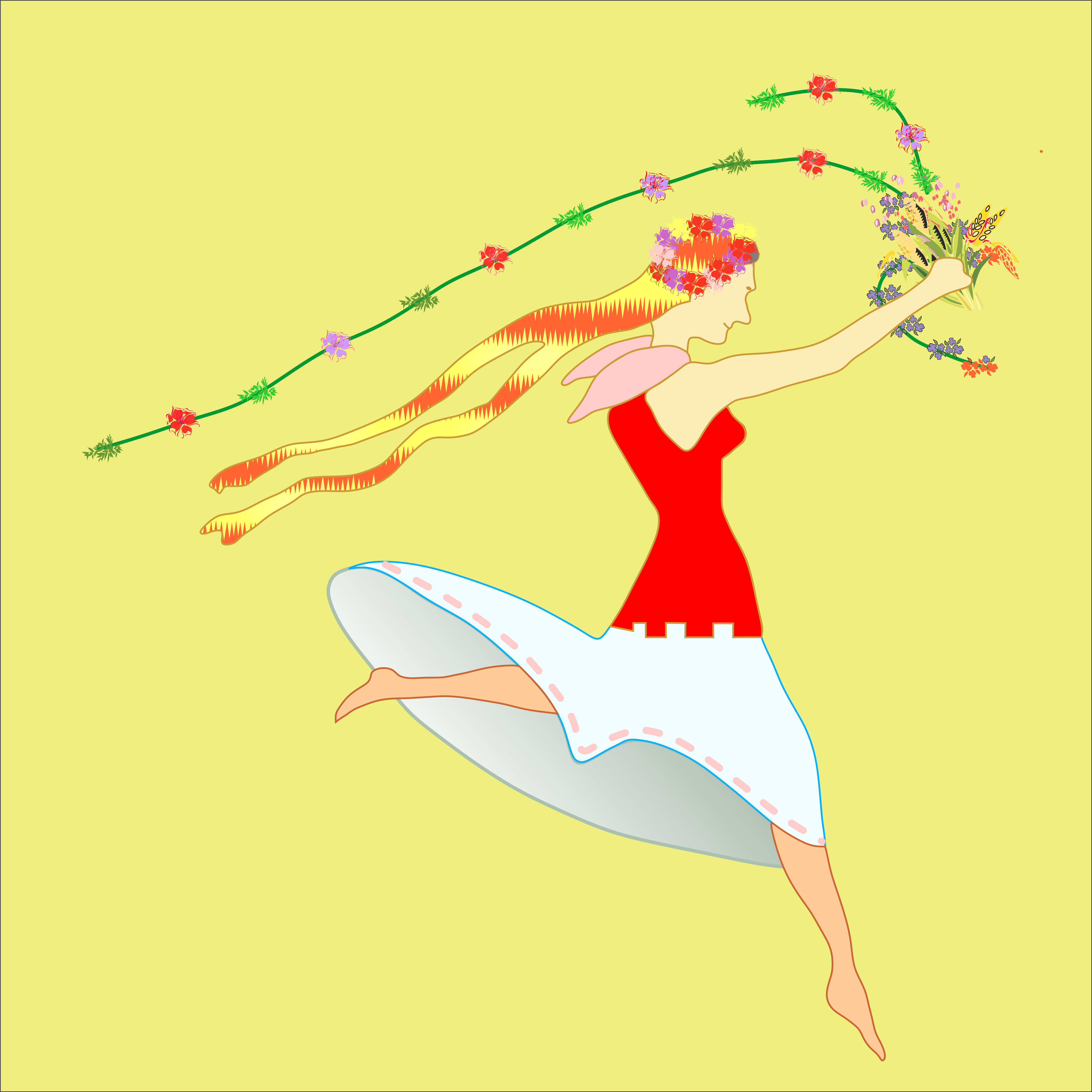 Znak malowany na samolotach 16 i eskadry wywiadowczej i 11 eskadry liniowej, stosowany w latach 1927 - 1932